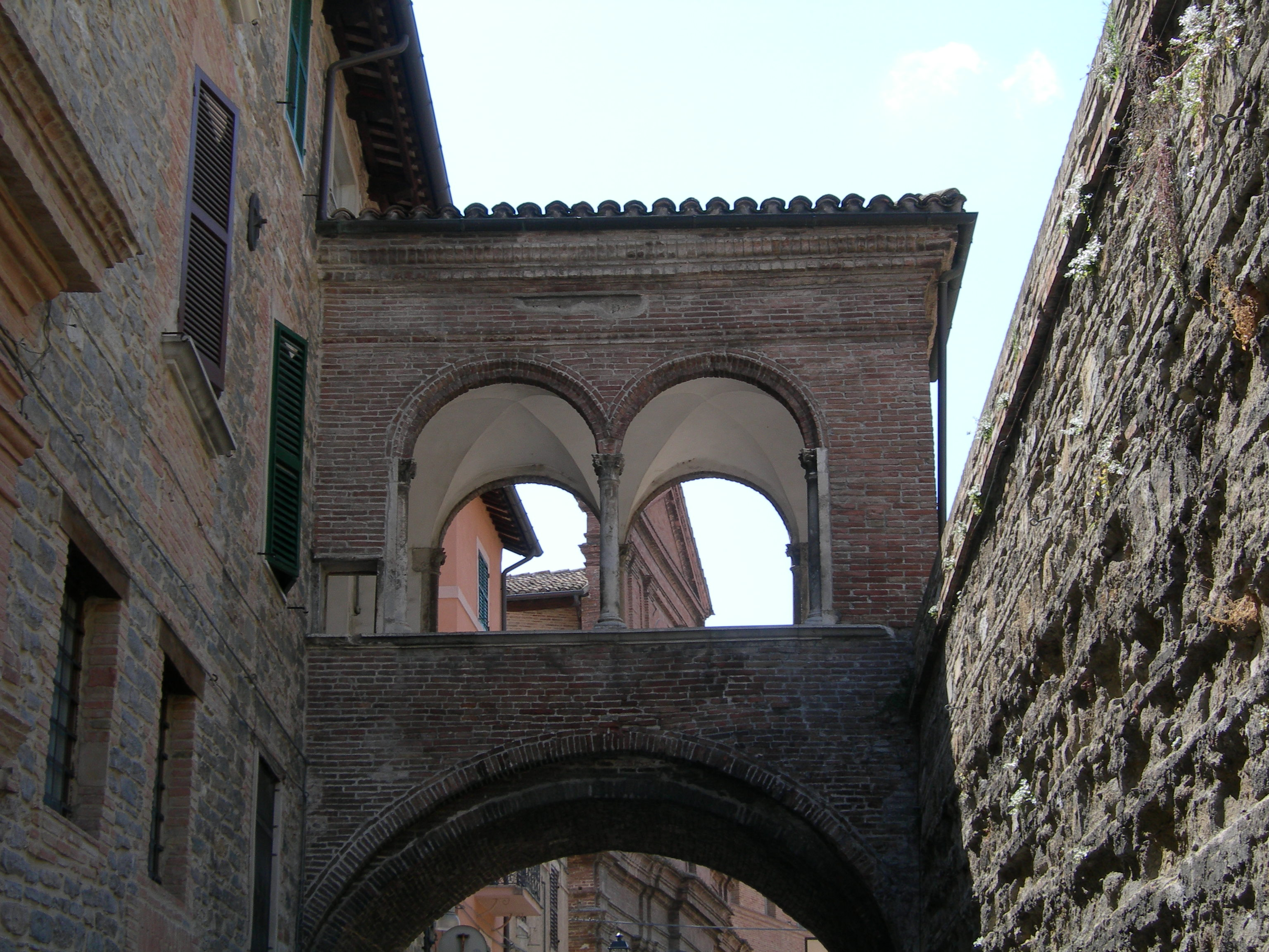 Loggetta degli ottoni sopra via Oberdan